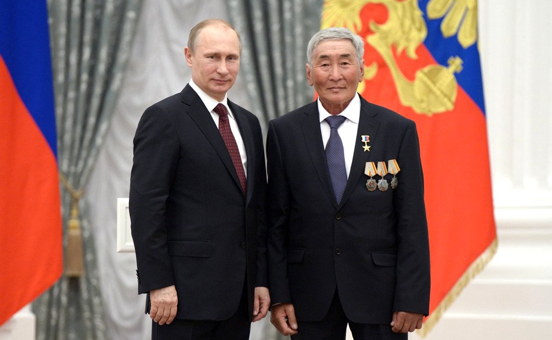 Москва, Кремль. 1 мая 2014 года. Церемония награждения Героев Труда Российской Федерации. Званием Героя Труда РФ награжден деятель сельского хозяйства Михаил Готовцев.